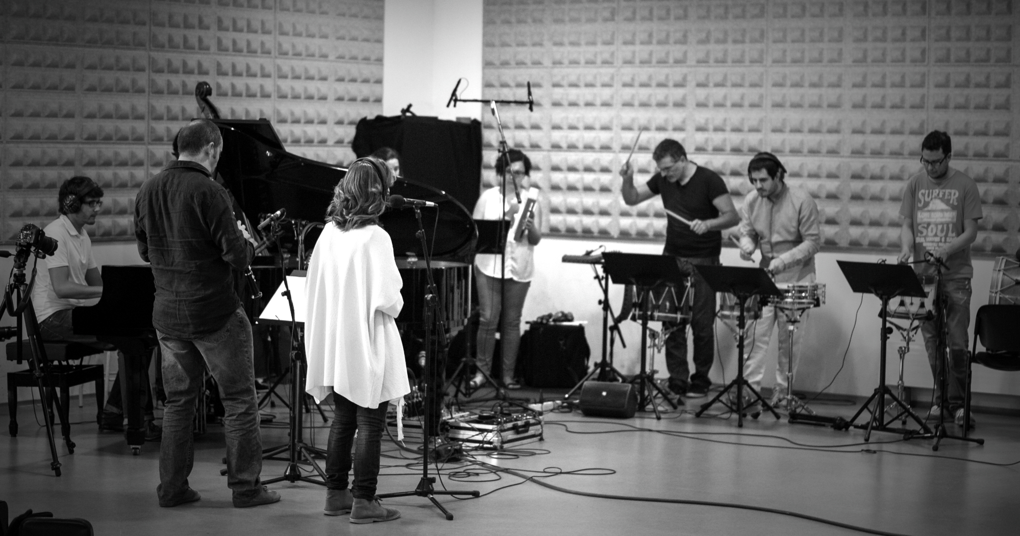 Gravación de Cantos de Poeta